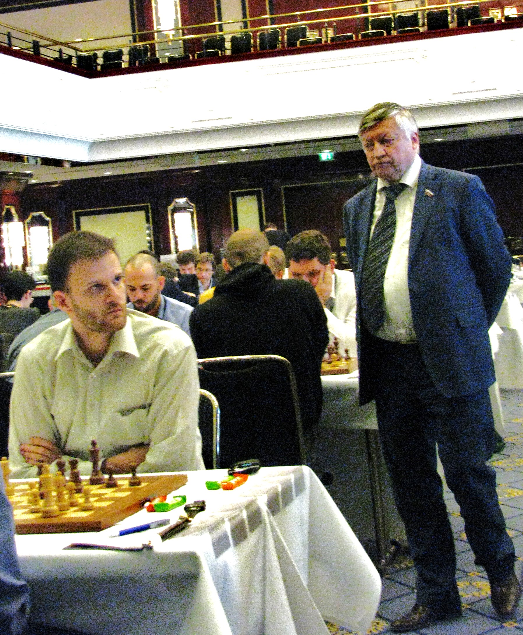 Anatoli Karpov (re.) und Csaba Balogh am 30. April 2017 in Berlin